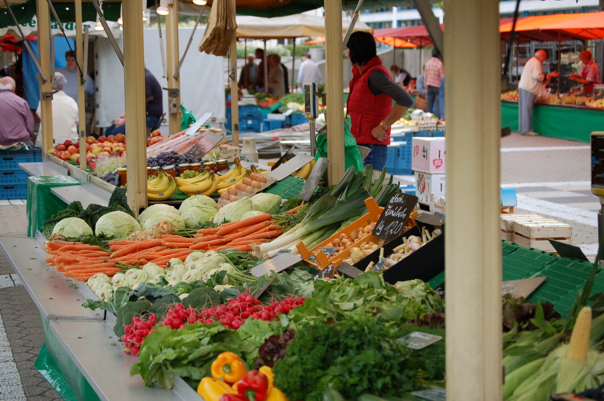 Markt Market Vegetables Wolfsburg